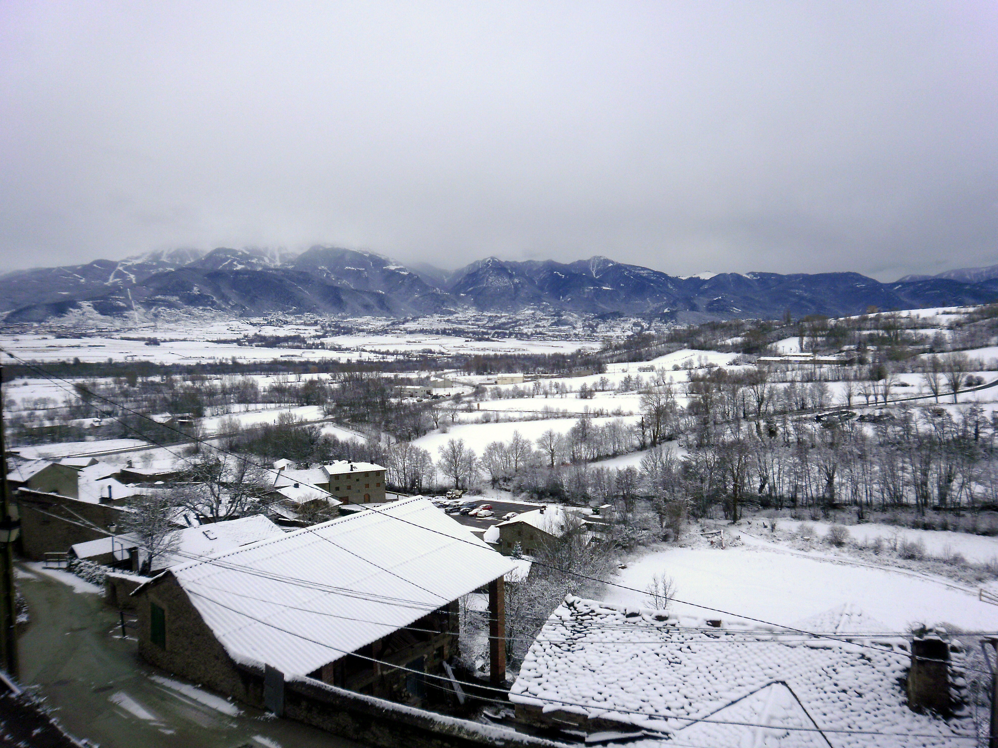 Vista desde Ger a l'hivern .09/02/2010